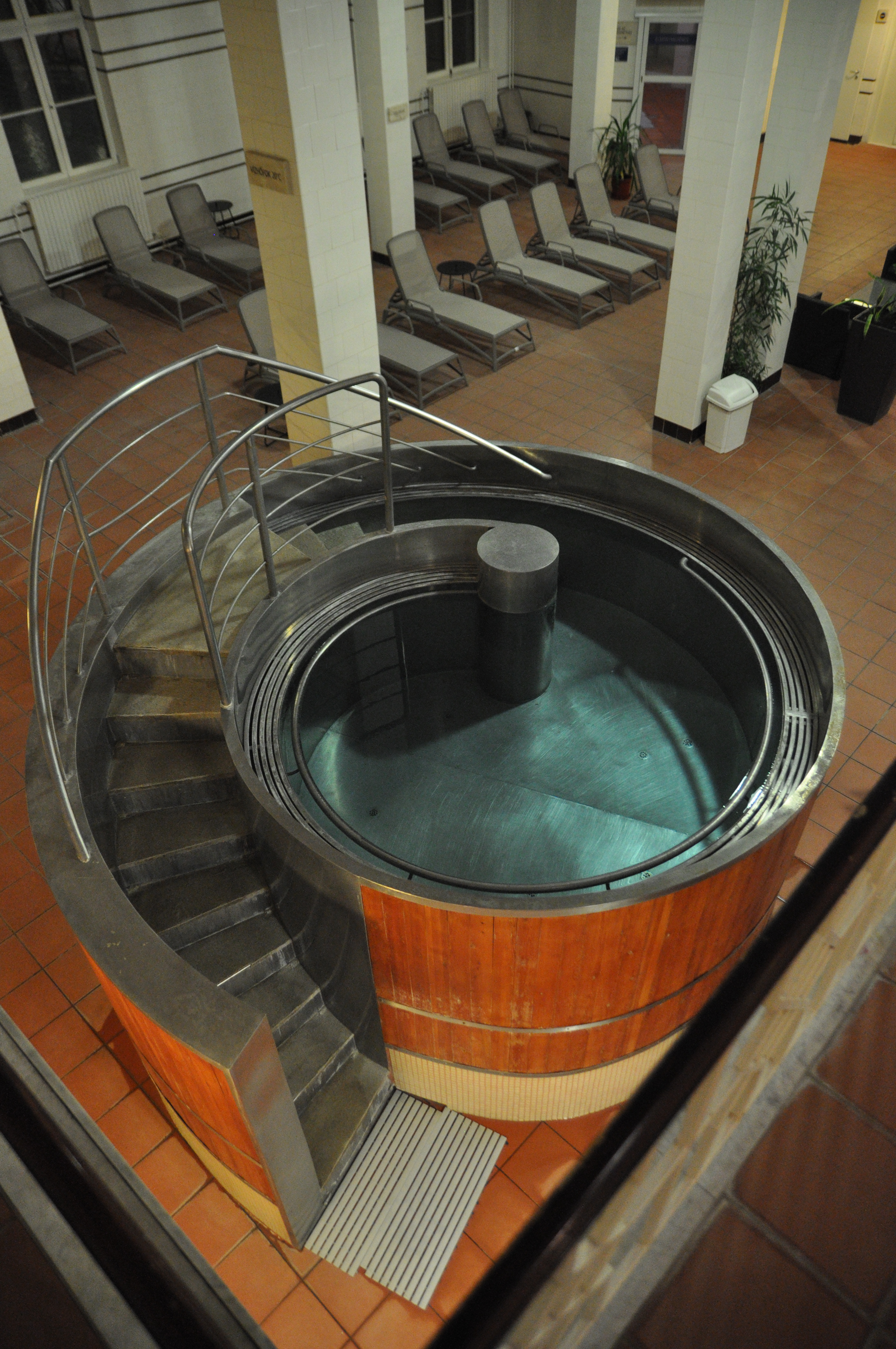 Budapest, Lukács fürdő, wellness részleg, merülőmedence